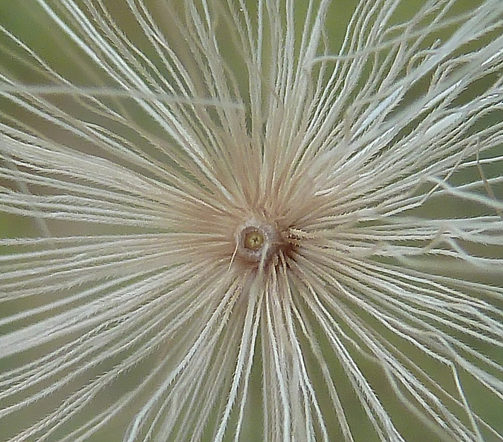 Carduus de la Sección Homalotepidoti ( Carduus pycnocephalus ) : Vilano, vista cenital donde se aprecian las cerdas finamente antrorsoescabridas. - La Huerta, Albatera (Alicante, España).